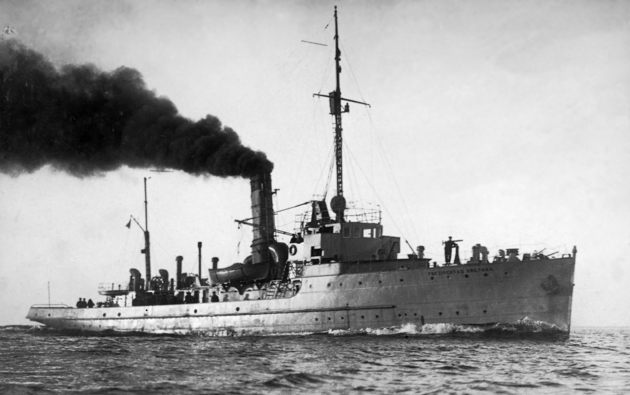 Pirmasis Lietuvos karo laivas „Prezidentas Smetona“.